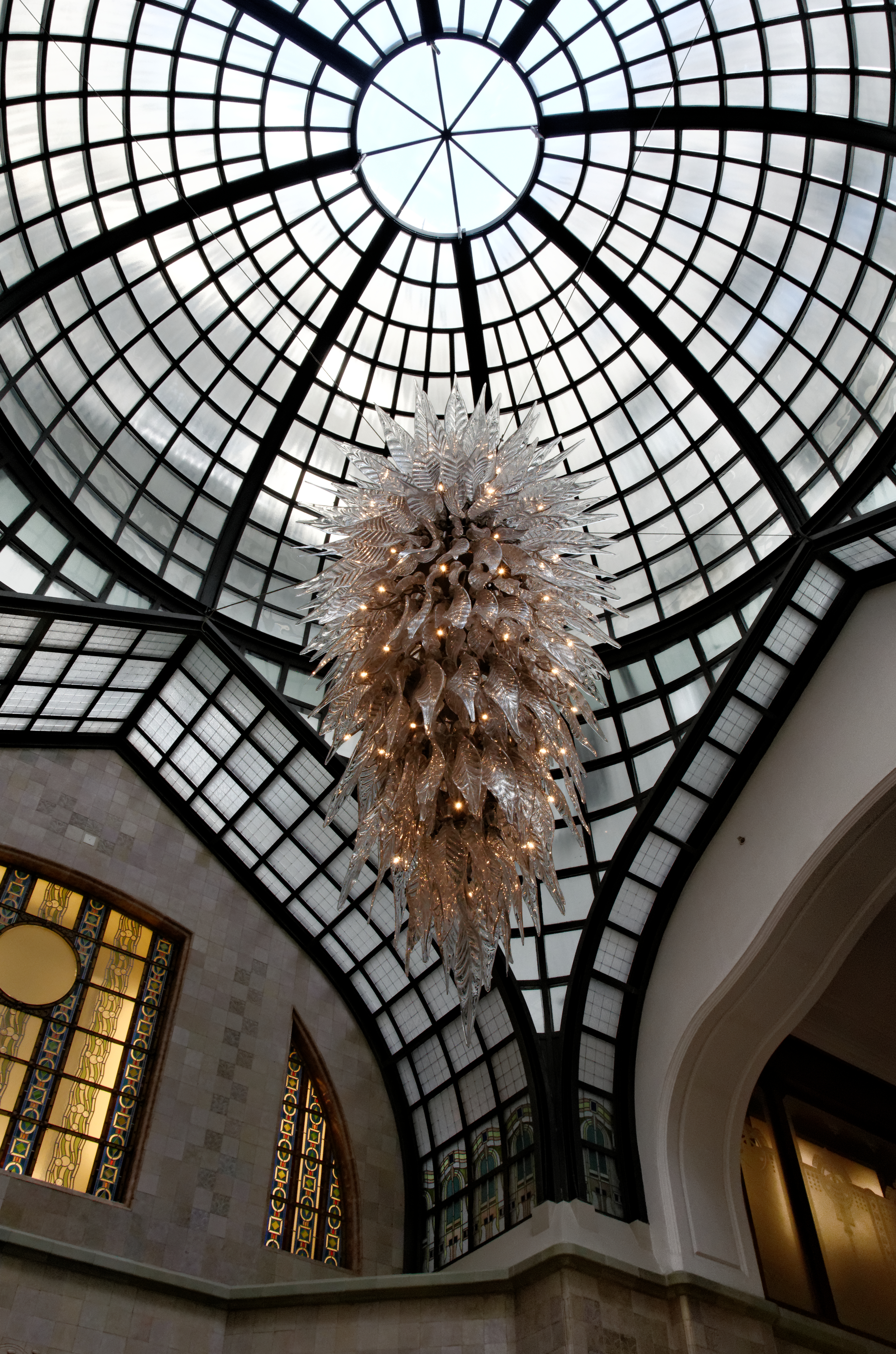 Lustre et verrière de la galerie du palais Gresham (aujourd'hui Four Seasons Gresham Palace Hotel), Széchenyi István tér Budapest. Le lustre est une création contemporaine.